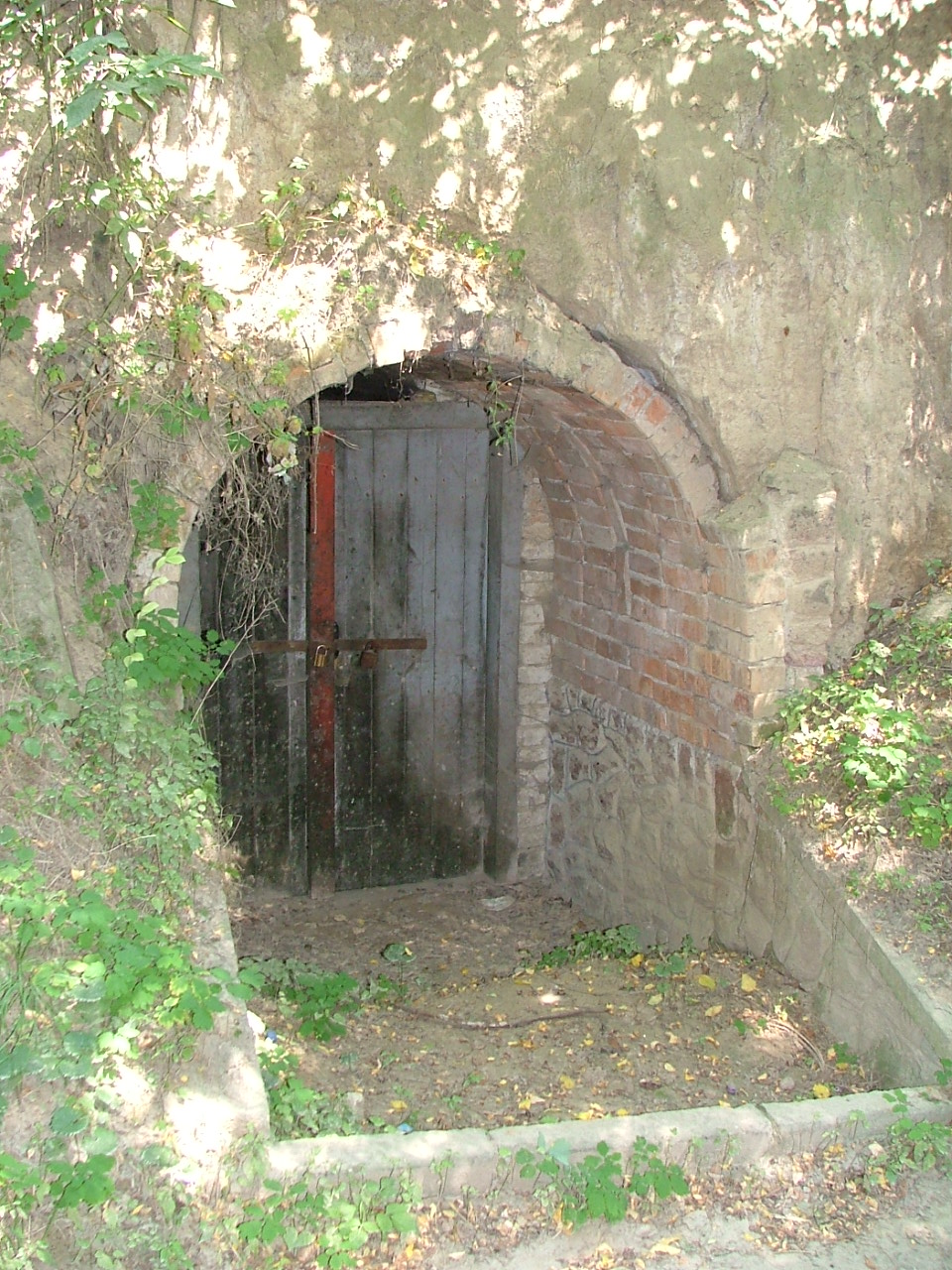 Löszbe vájt pince a Szurdikban (Nyúl, Magyarország)